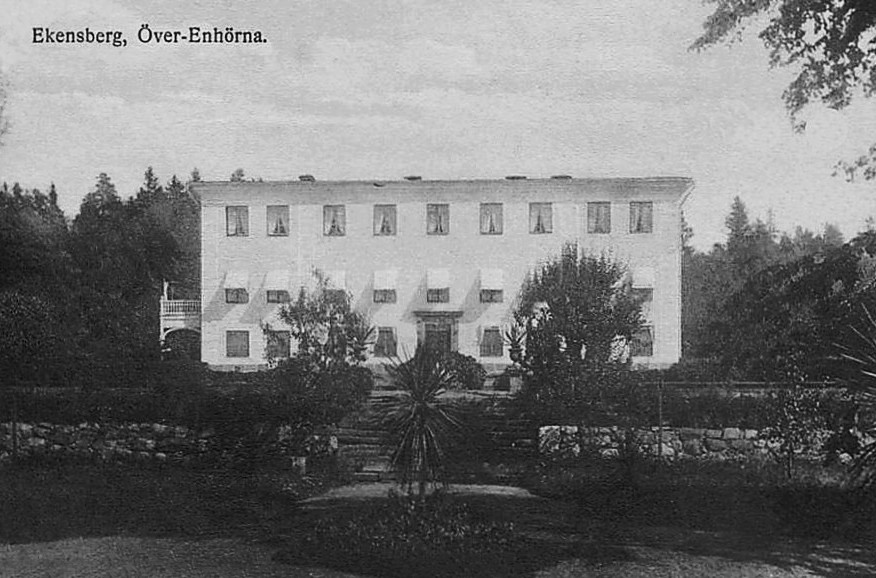 Ekensbergs herrgård